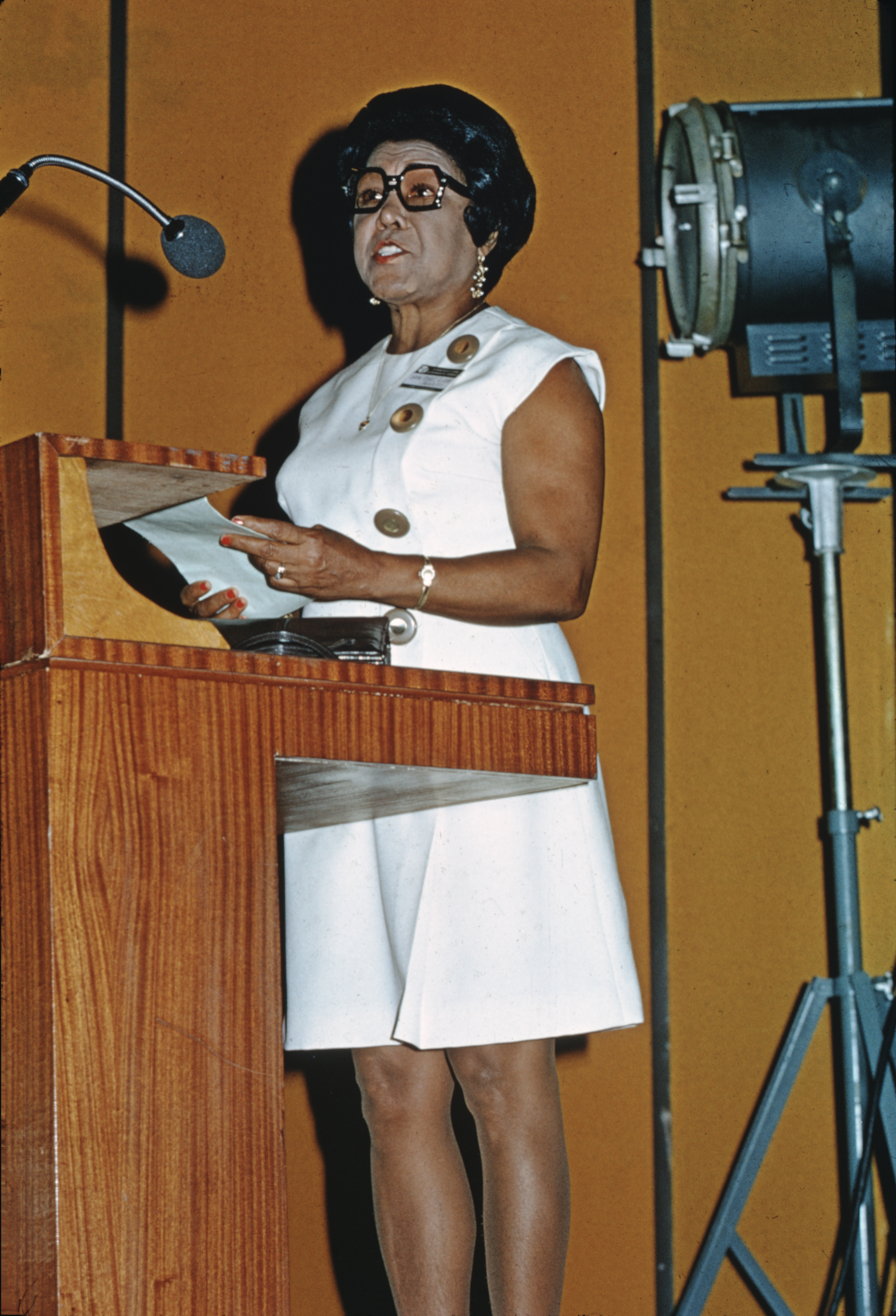 Colloque sur la promotion de la femme face aux responsabilités communales, organisé conjointement par l'Agence de coopération culturelle et technique et la Fédération mondiale des Villes jumelées à Lomé au Togo du 26 au 31 juillet 1975. Rose Agatha Leon, ministre des colelctivités locales de Jamaïque.